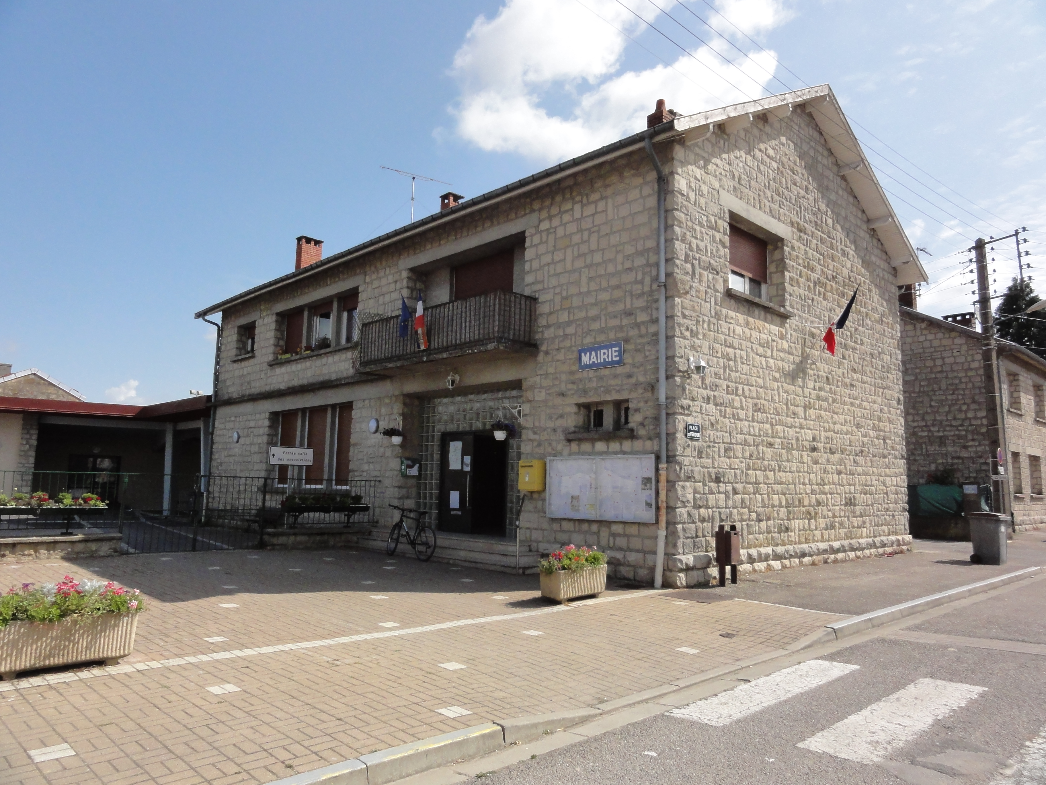 Robert-Espagne (Meuse) mairie